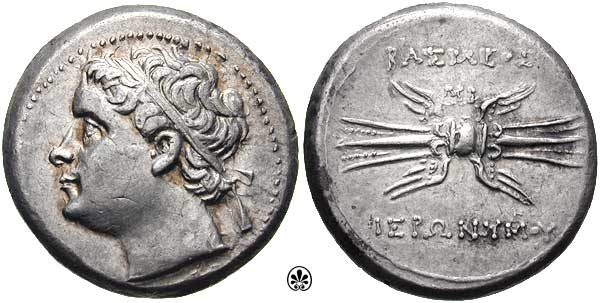 Coin of Hyeronimus.